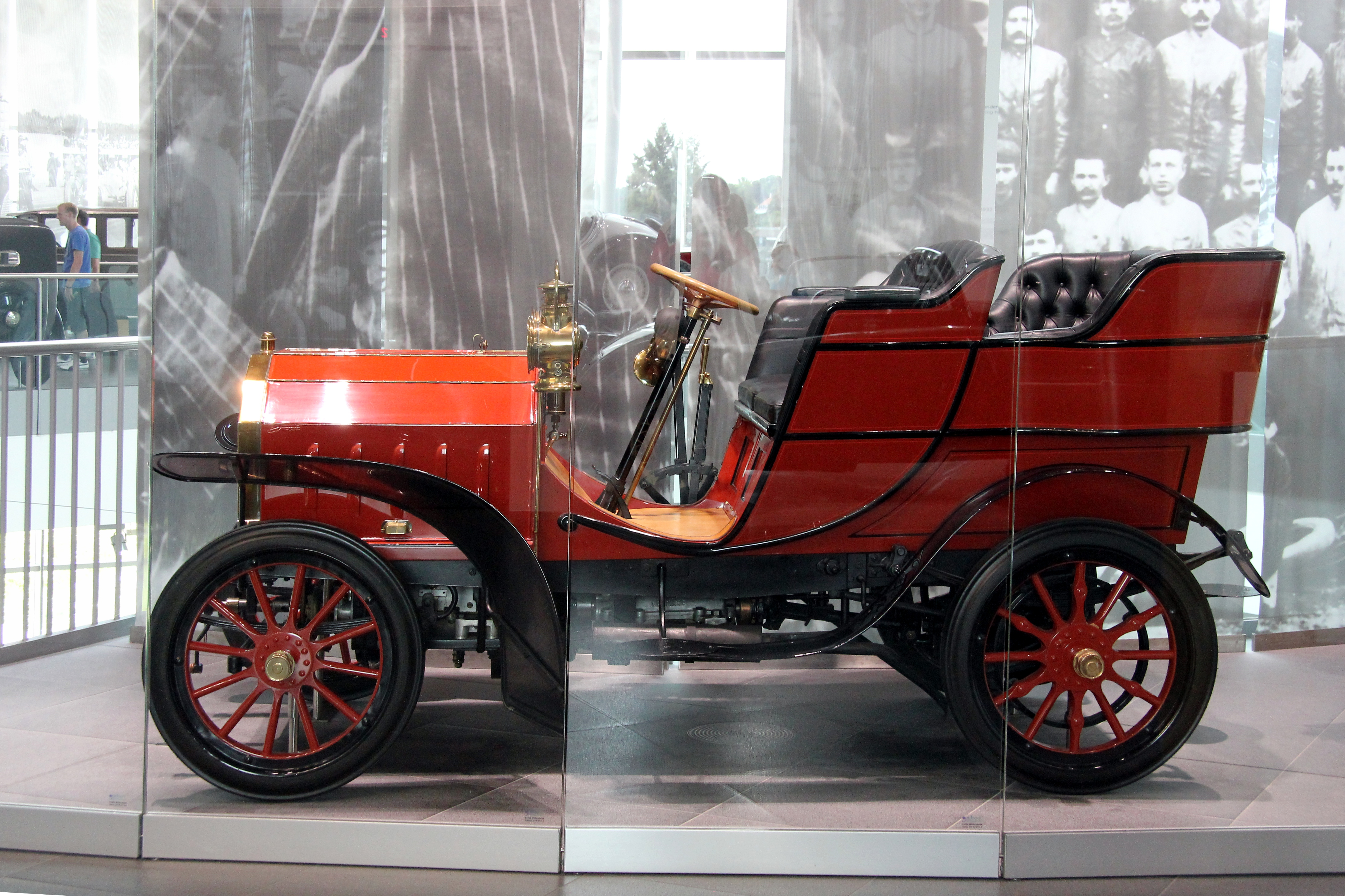 Horch Tonneau, Baujahr 1903. Etwa 40 Stück dieses Wagens wurden von 1902 bis 1903 gebaut. Er hatte einen Zweizylinderviertaktmotor, Hubraum ca. 2500 cm³, ca. 10–12 PS; die Höchstgeschwindigkeit lag bei 50 km/h. Eine Besonderheit war der Kardanantrieb statt der damals üblichen Kette. Preis des Autos: 7.200 Mark